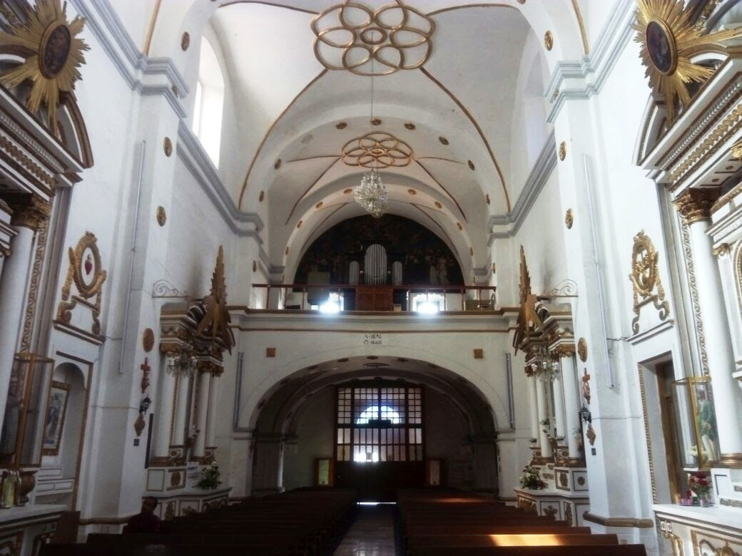 Interior of the Churche of Ex monastery of Saint Francis of Assisi, Pachuca